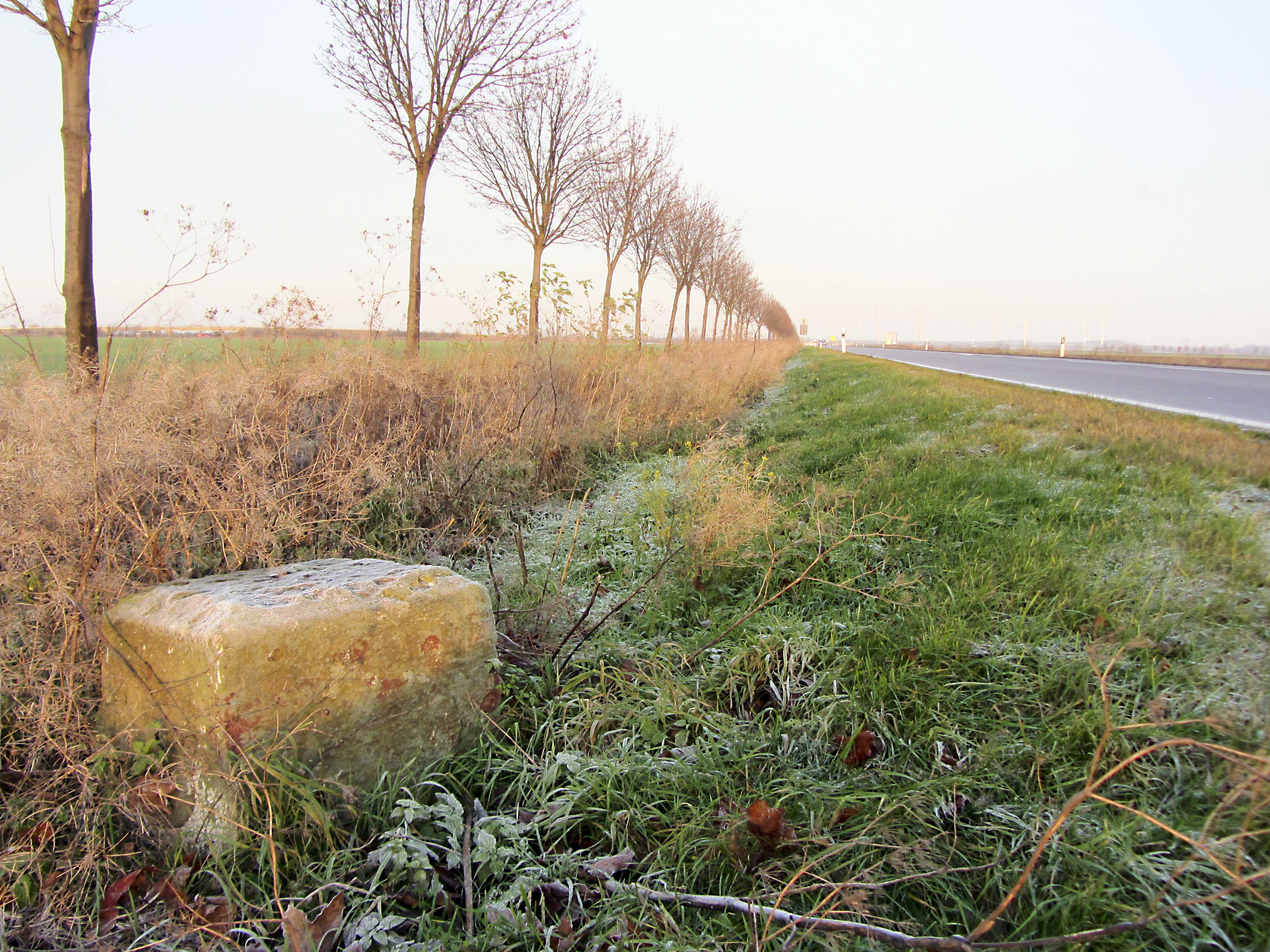 Preußischer Viertelmeilenwürfel (0235) an der L 50 nahe Abzweig Lettewitz